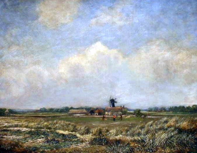 Landscape